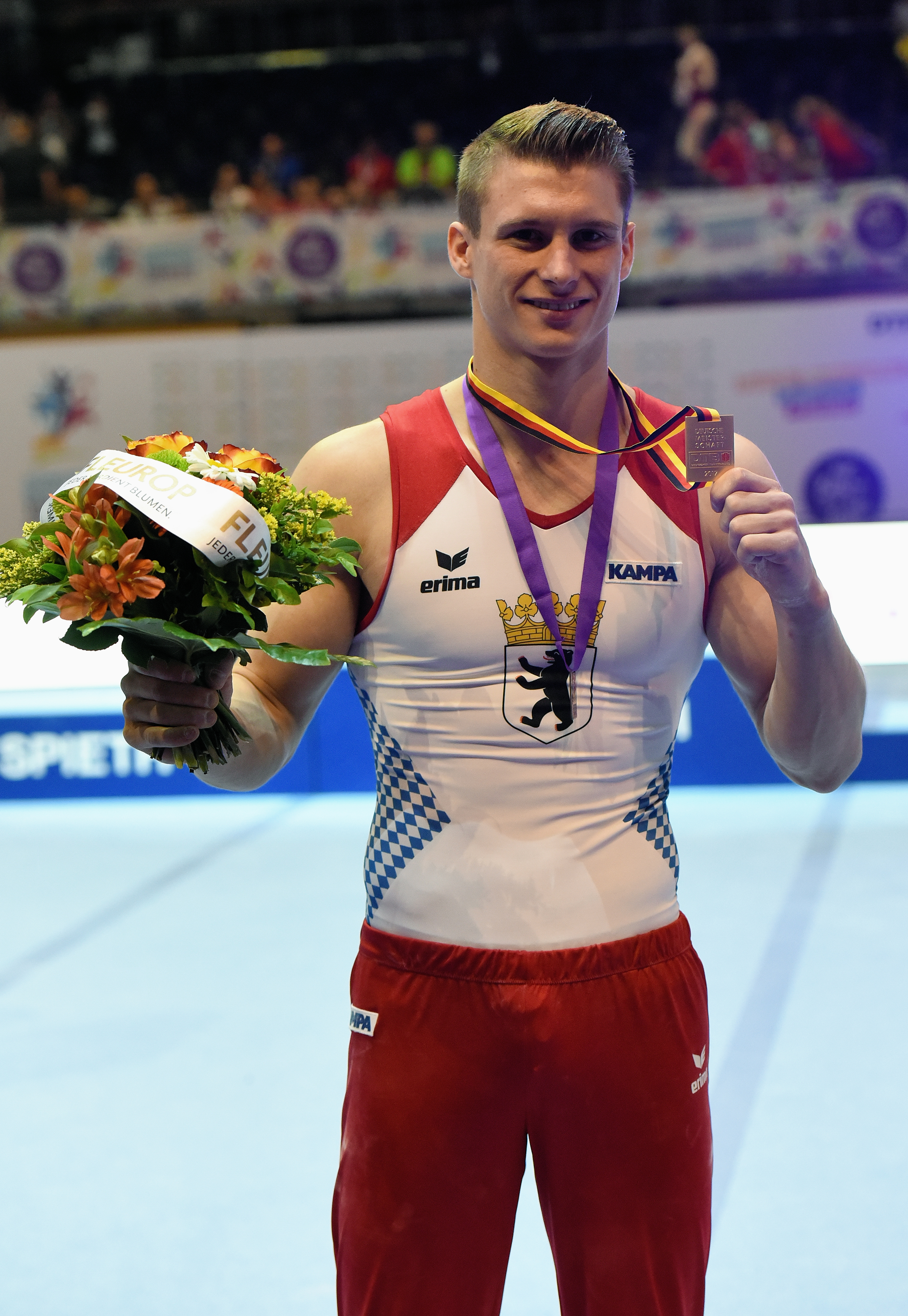 Deutsche Meisterschaften Gerätturnen Mehrkampf männlich Siegerehrung beim Internationalen Deutschen Turnfest Berlin 2017. Abgebildet: Lukas Dauser.